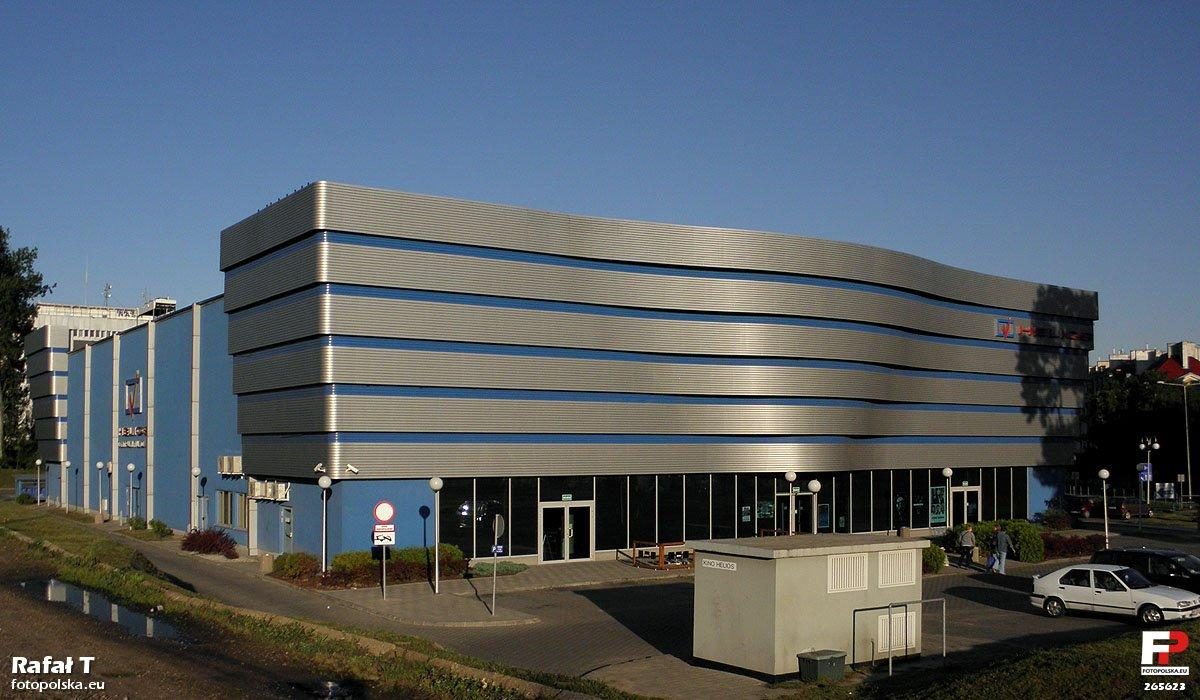 Pierwsze nowoczesne kino w Radomiu.